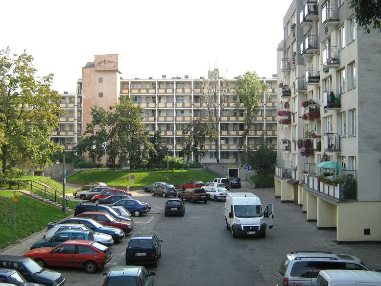 Przyczółek Grochowski Housing estate in Warsaw (Poland) Osiedle Przyczółek Grochowski w Warszawie